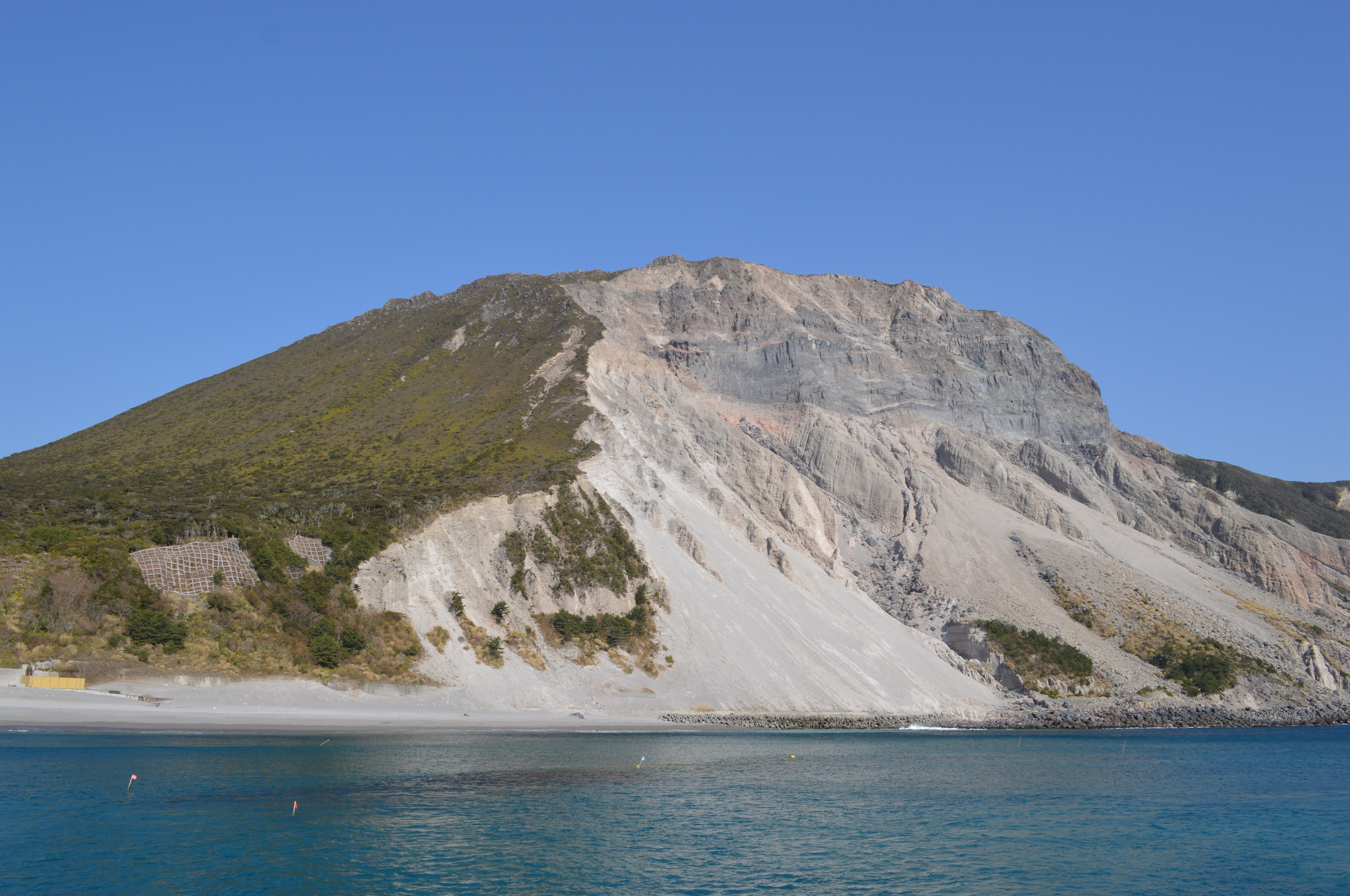 天上山 (多幸湾より)